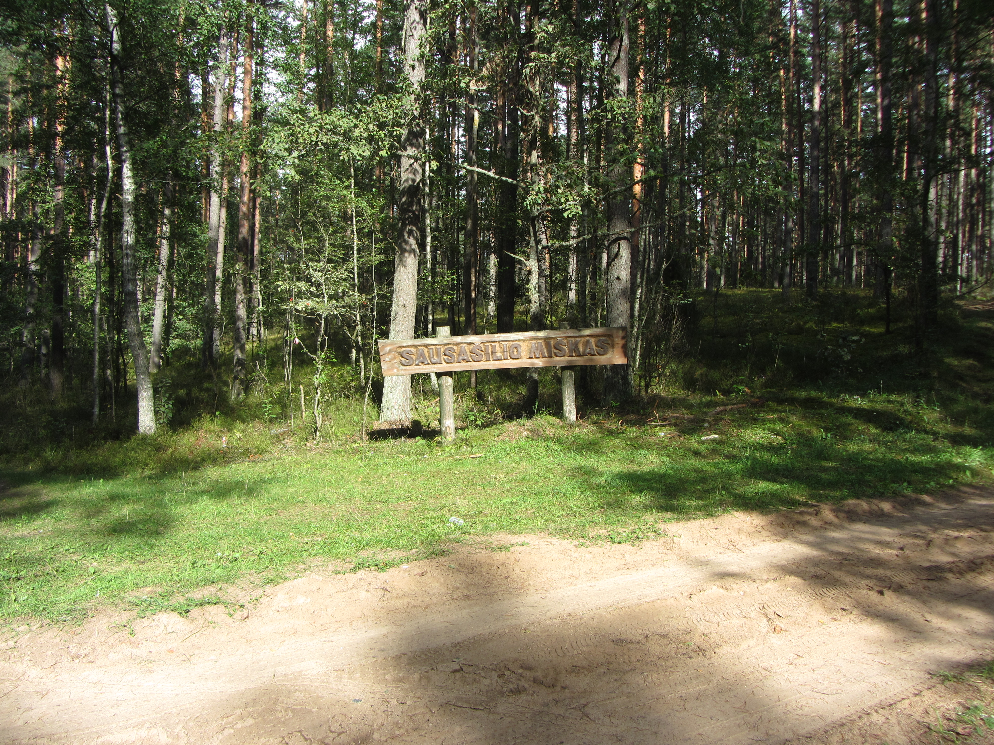 Dūkšto sen., Lithuania